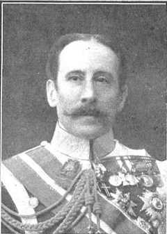 Retrato de Ramón Echagüe y Méndez Vigo, conde del Serrallo, fotografía de Christian Franzen recogida en la revista española Mundo Gráfico.